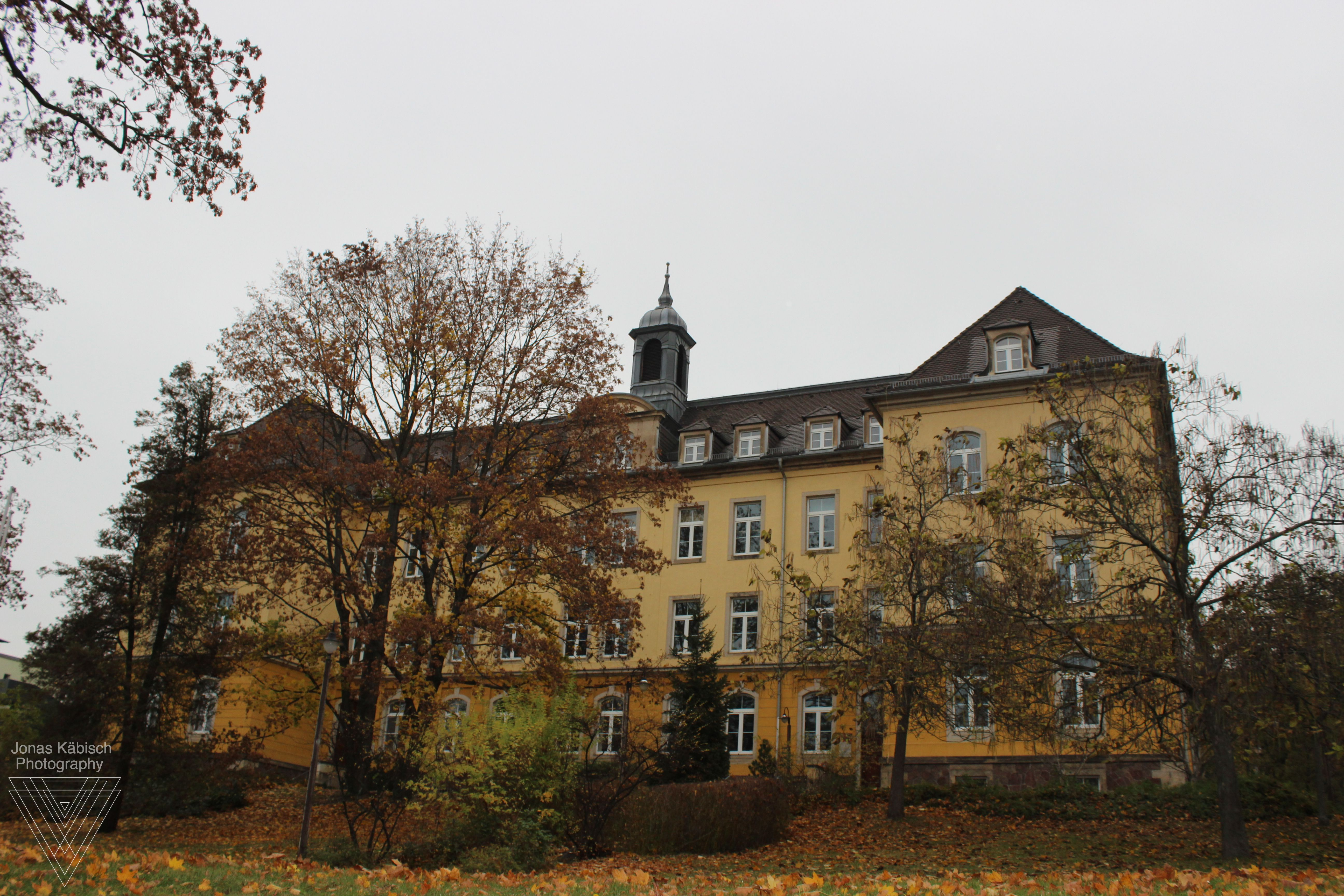 "Johann-Friedrich-Jencke-Schule" , Förderzentrum für Hörgeschädigte in der Maxim-Gorki-Straße 4 01127 Dresden Dieses Bild wurde im Winter 2016 aufgenommen.